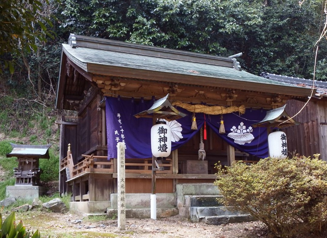 新居大島の八幡神社の右にある大元神社本殿